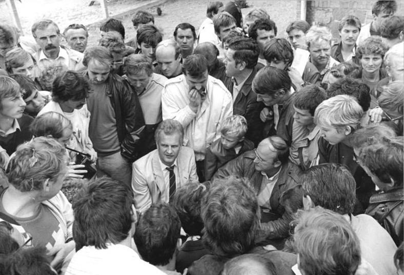 ADN-ZB-Kluge 7.10.86-eng-Bez. Leipzig: "Alle reden vom Fußball, wir spielen" - zum Finale dieser Junge-Welt-Aktion waren bekannte Fußballer der DDR in die Gemeinde Krostitz gekommen. Nationaltrainer Bernd Stange (Mitte) war dicht umlagert und beantwortete Fragen großer und kleiner Fußballfans."